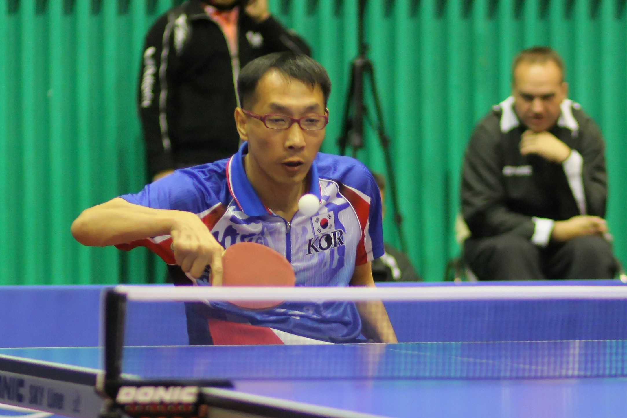 (KOR)